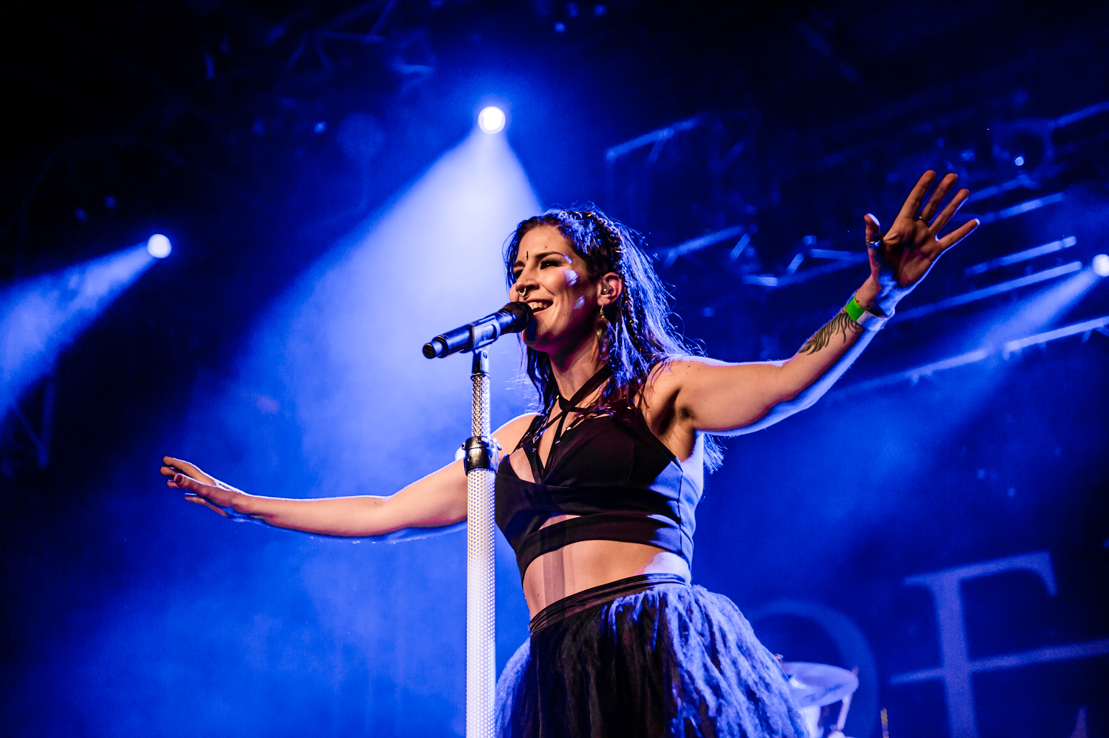 'Delain - Epic Metal Fest - Eindhoven'